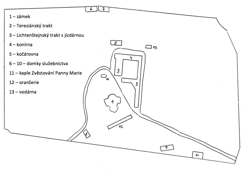 Nákres půdorysu zámeckého areálu zámku Karlova Koruna